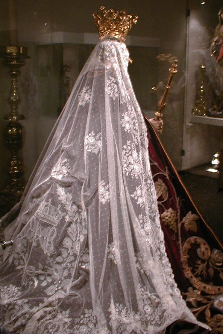 Eigen opname kanten sluier Mariabeeld Sint-Niklaas